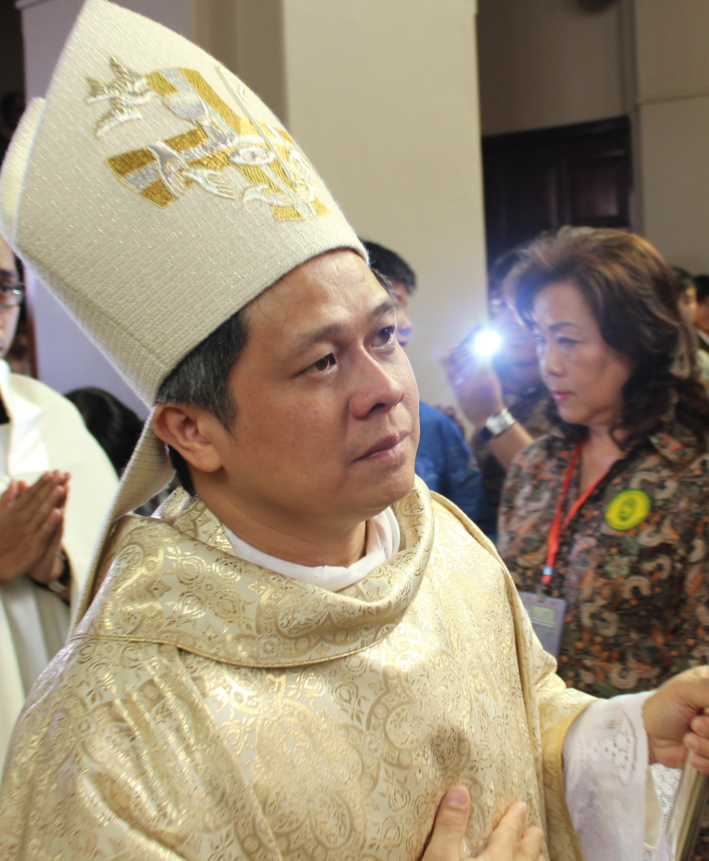 Mgr. Antonius Subianto Bunjamin, Uskup Keuskupan Bandung